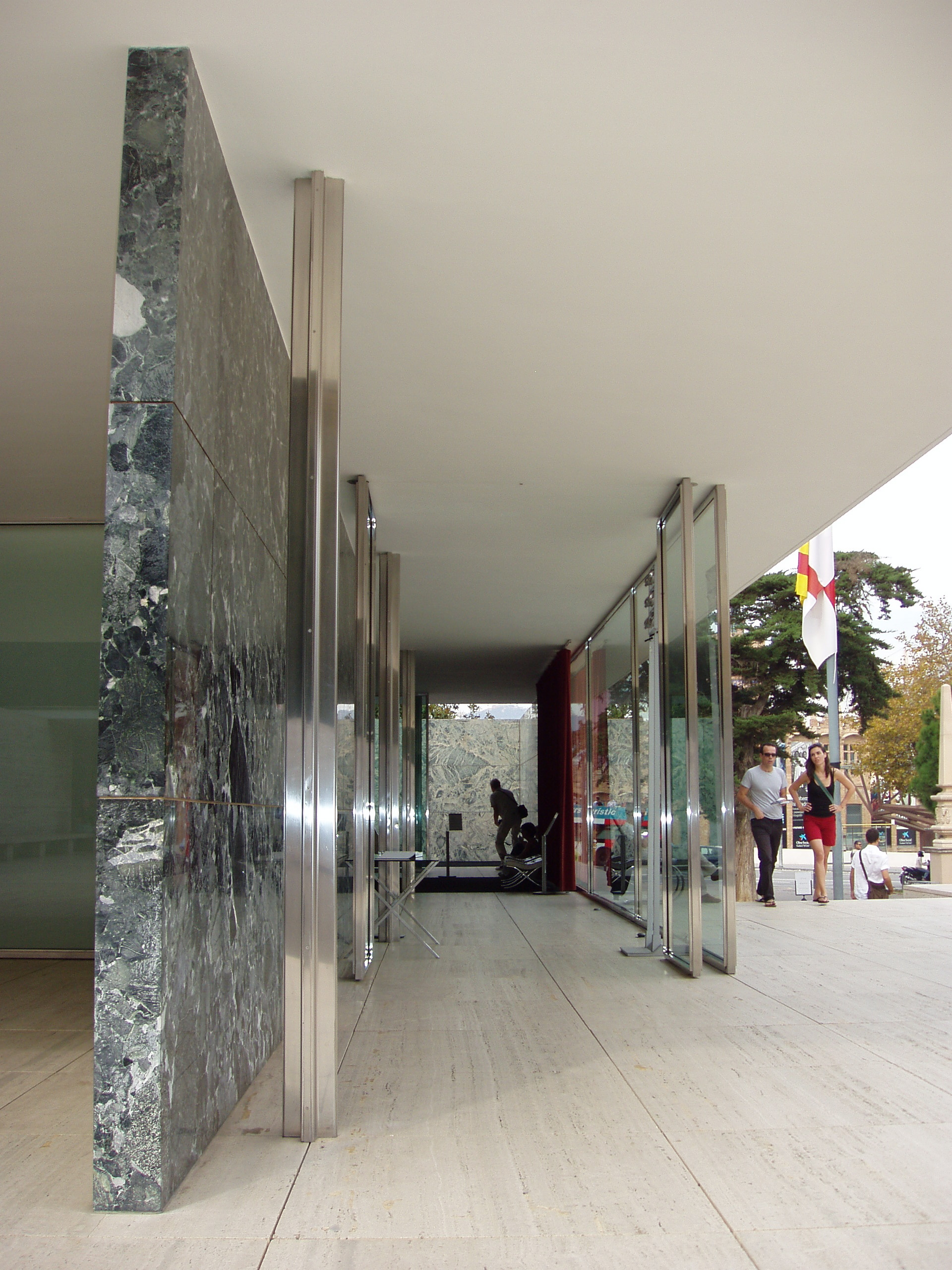 Pabellón de Alemania en la Exposición Universal de Barcelona 1929 (reconstruido). Arquitecto Ludwig Mies van der Rohe.